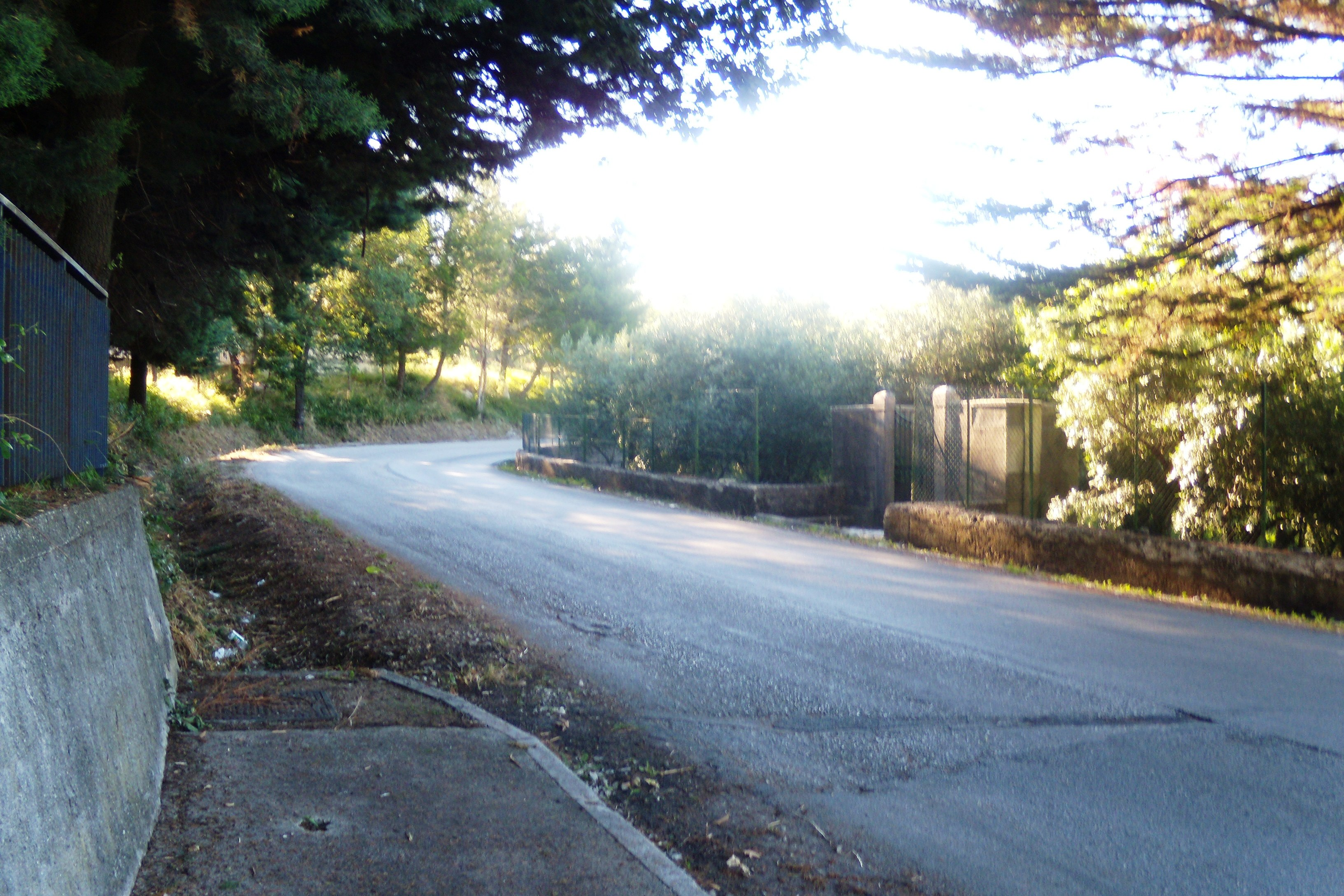 Veduta particolare della strada provinciale Cerreto Sannita - Guardia Sanframondi (Italia).